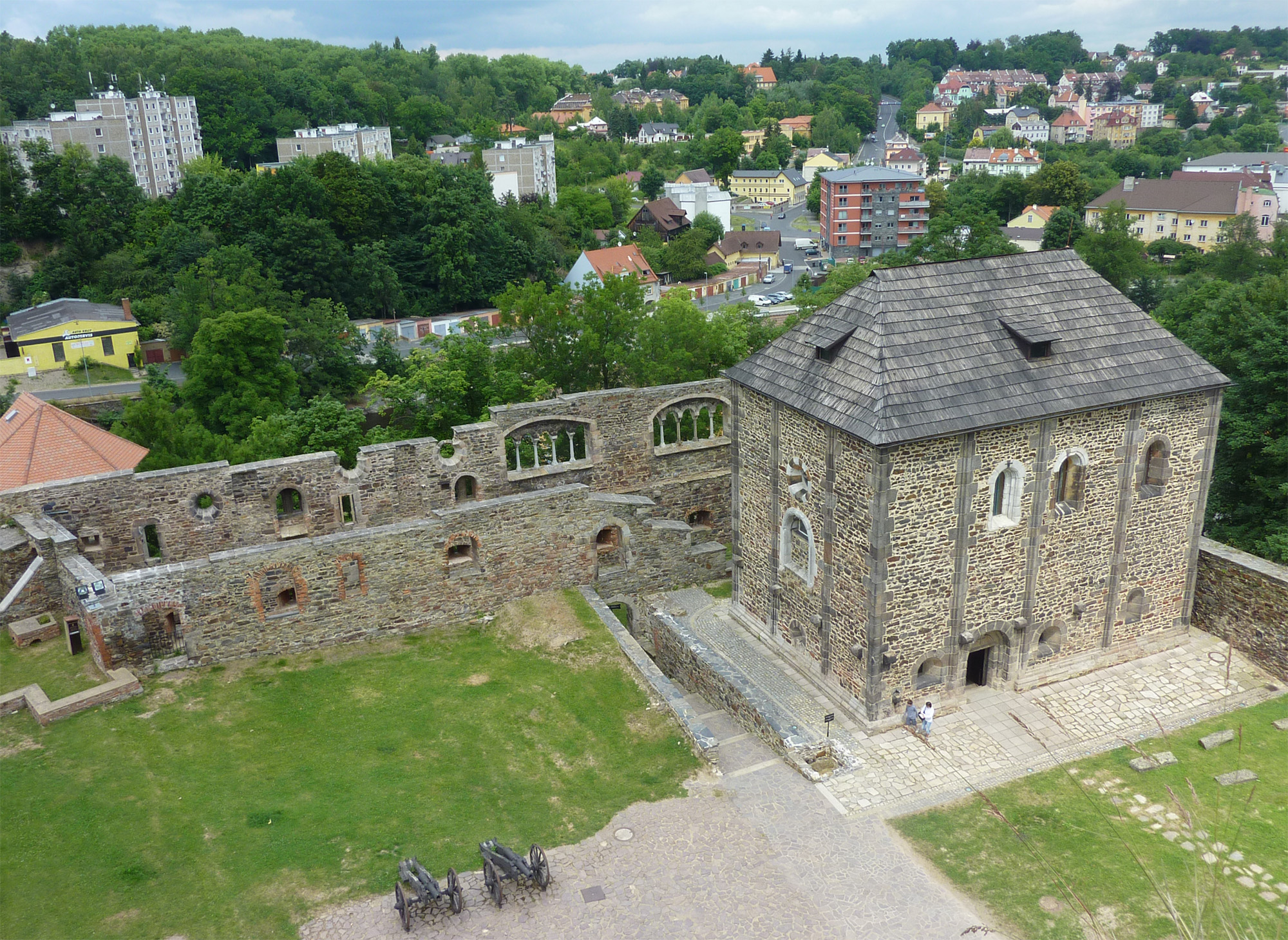 Ehemalige Kaiserpfalz von Eger mit Resten des Palas (links) und Doppelkapelle (rechts)